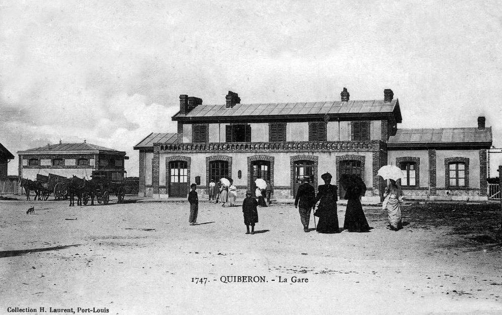 Le bâtiment voyageurs vu de la place, vers 1900.